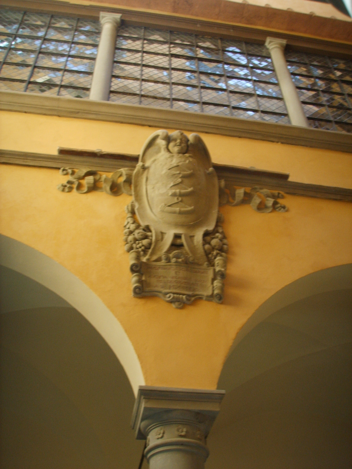 Palazzo guicciardini, stemma cortile